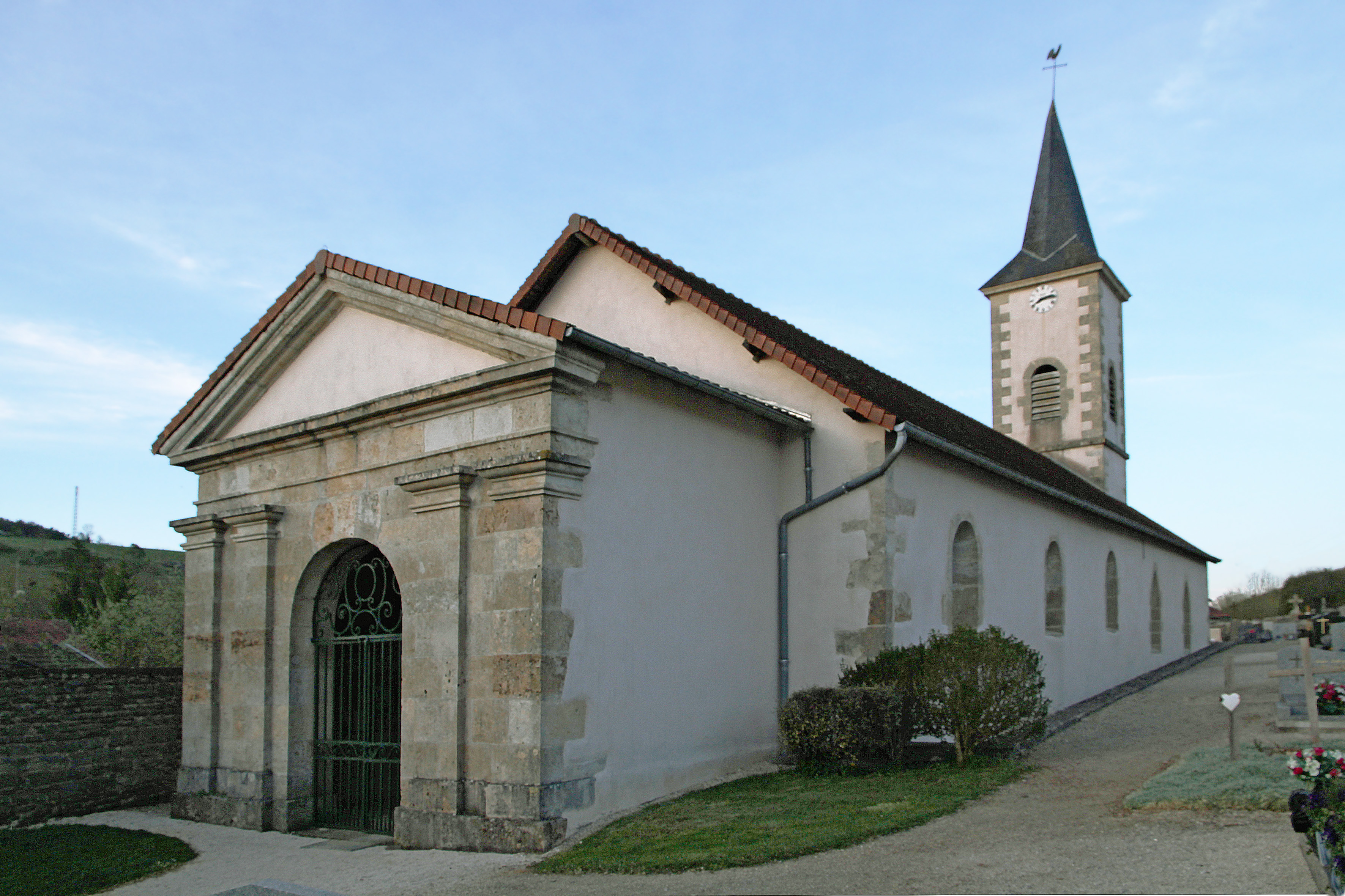 Église Saint-Pierre de Pellerey